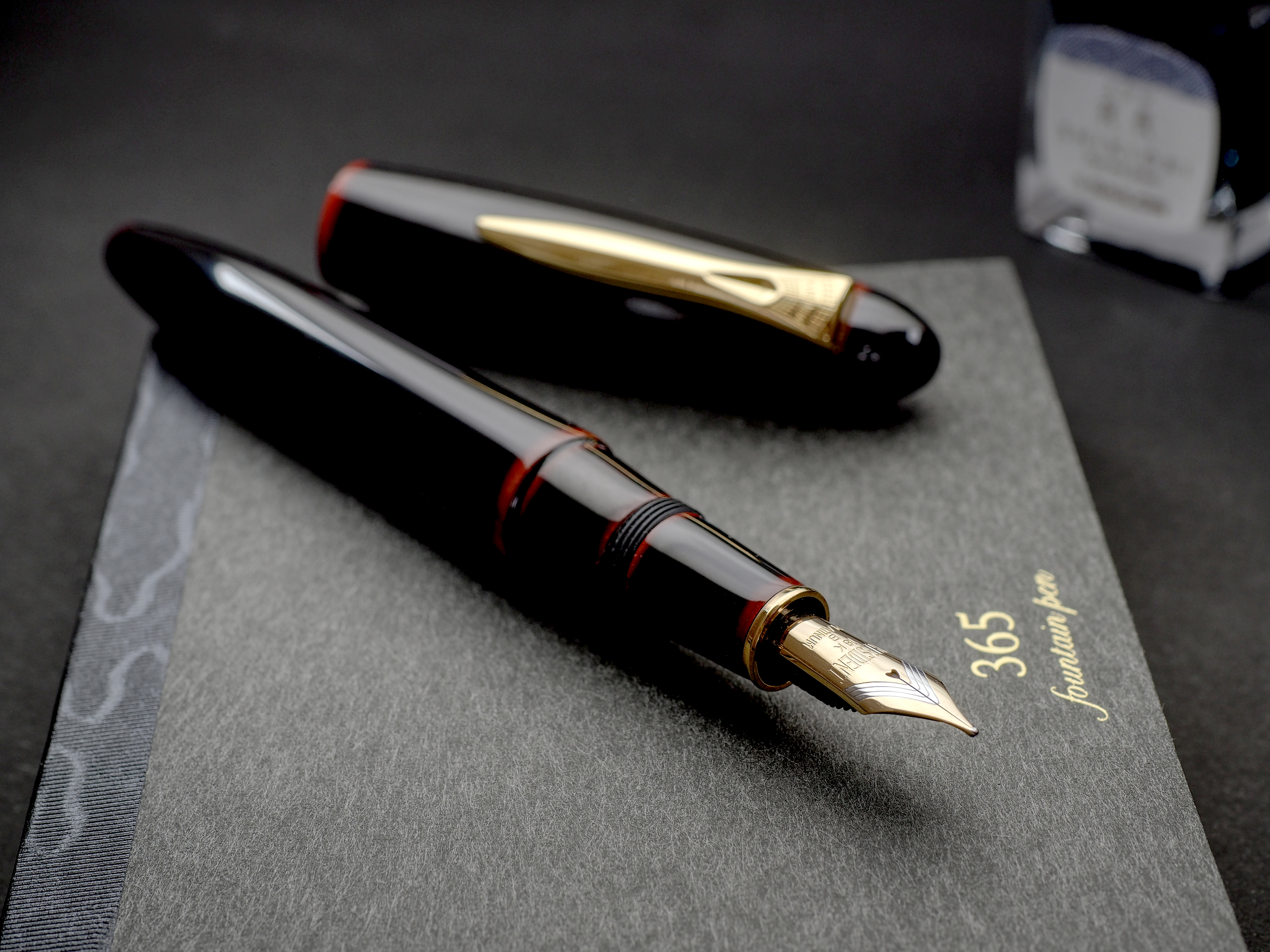 Platinum Izumo